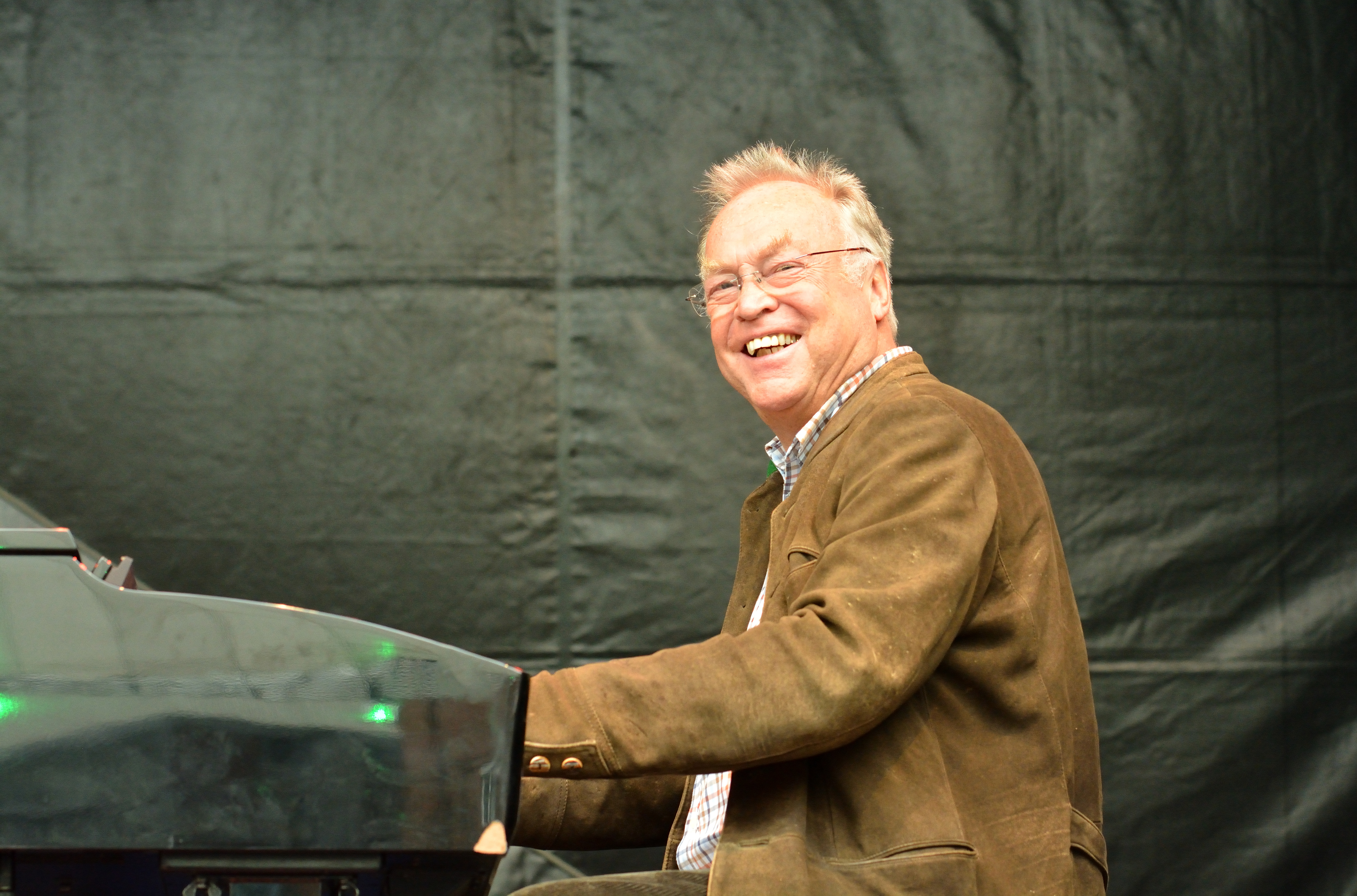 Gottfried Böttger beim Holsten Brauereifest 2016 in Hamburg